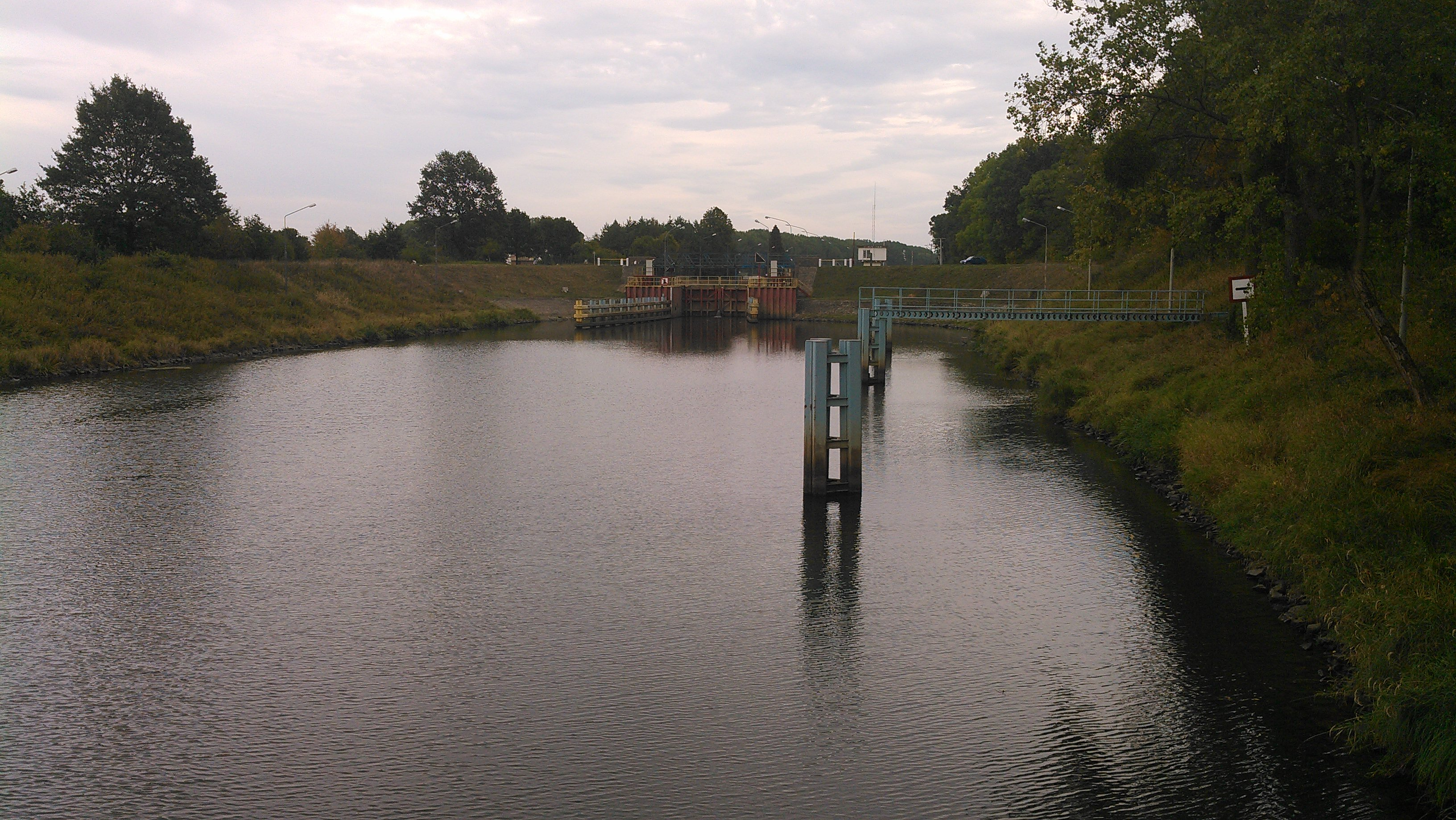 Awanport Śluzy Ratowice po stronie północno-zachodniej